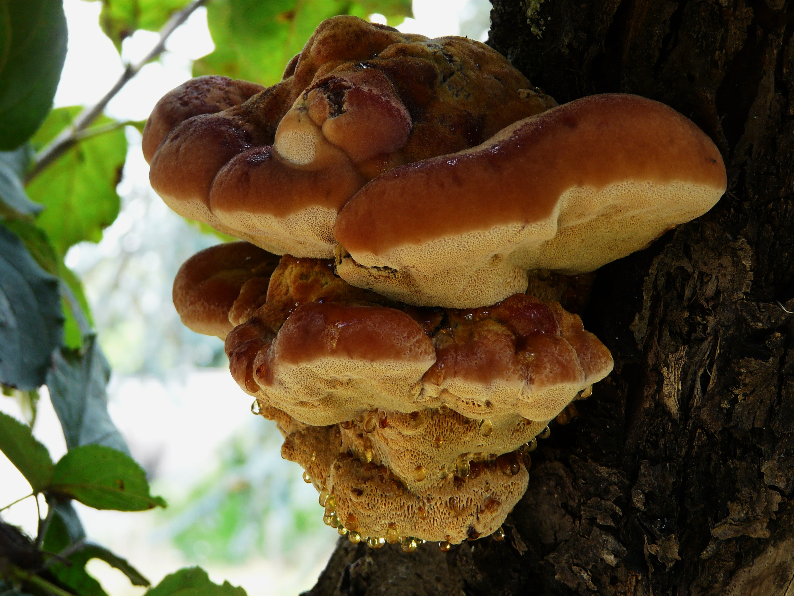 Polypore hérissé (Inonotus hispidus)